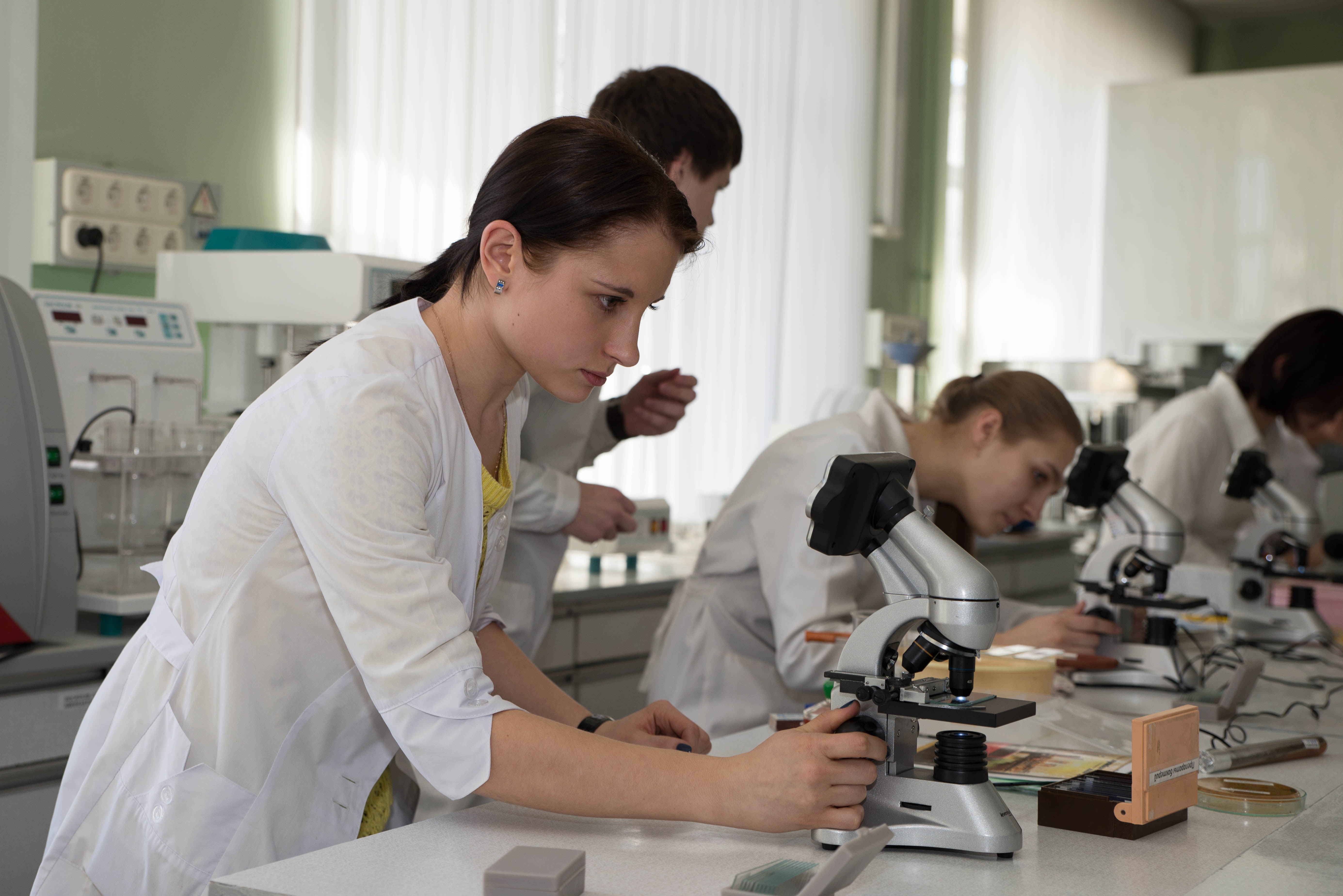 Занятия в университете